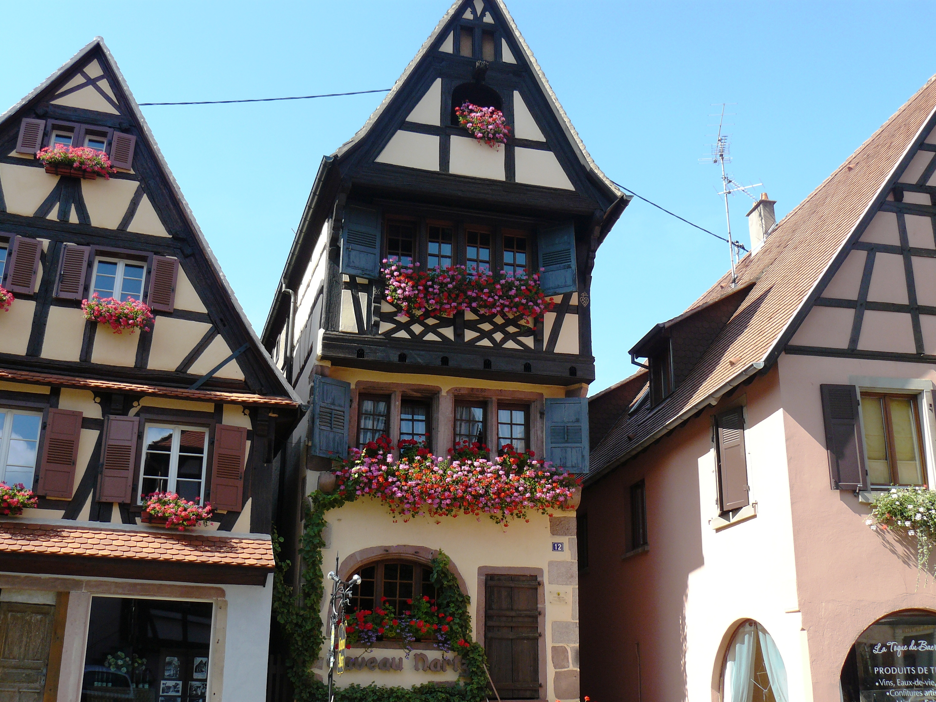 Maison de type médiéval construit en 1686 construit par le sabotier Alexandre Sermonet originaire de Savoie qui s'est établi à Dambach après la guerre de Trente Ans